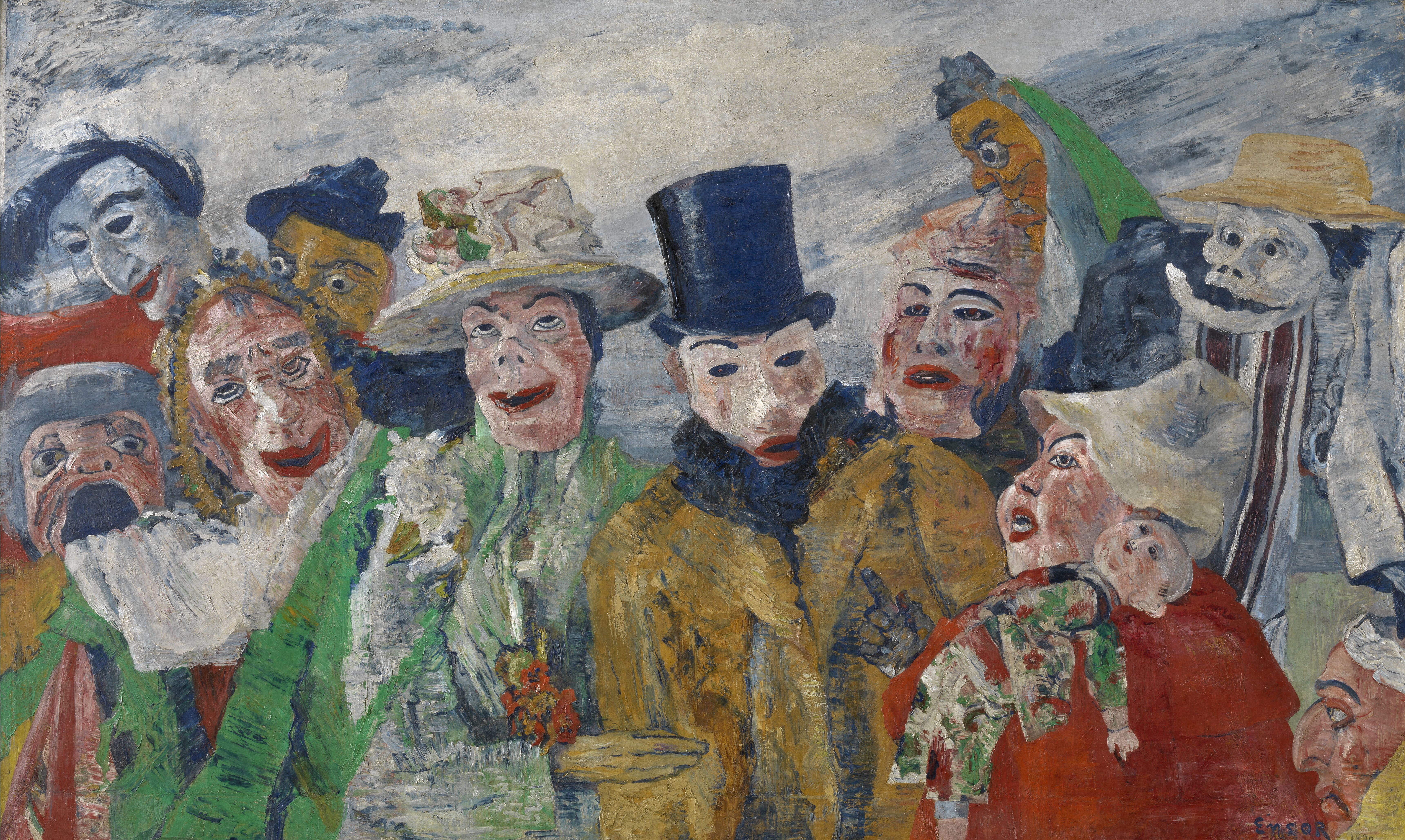 "L'Intrigue", 1890 James Ensor Huile sur toile - Dimensions : 90 x 149 Collection du Musée royal des Beaux-Arts d'Anvers - N° d'inventaire : 185